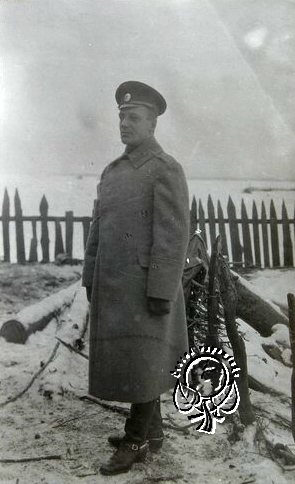 Jaroslav Igor Vilímek (1890 - 1917), Český vlastenec, starodružiník.